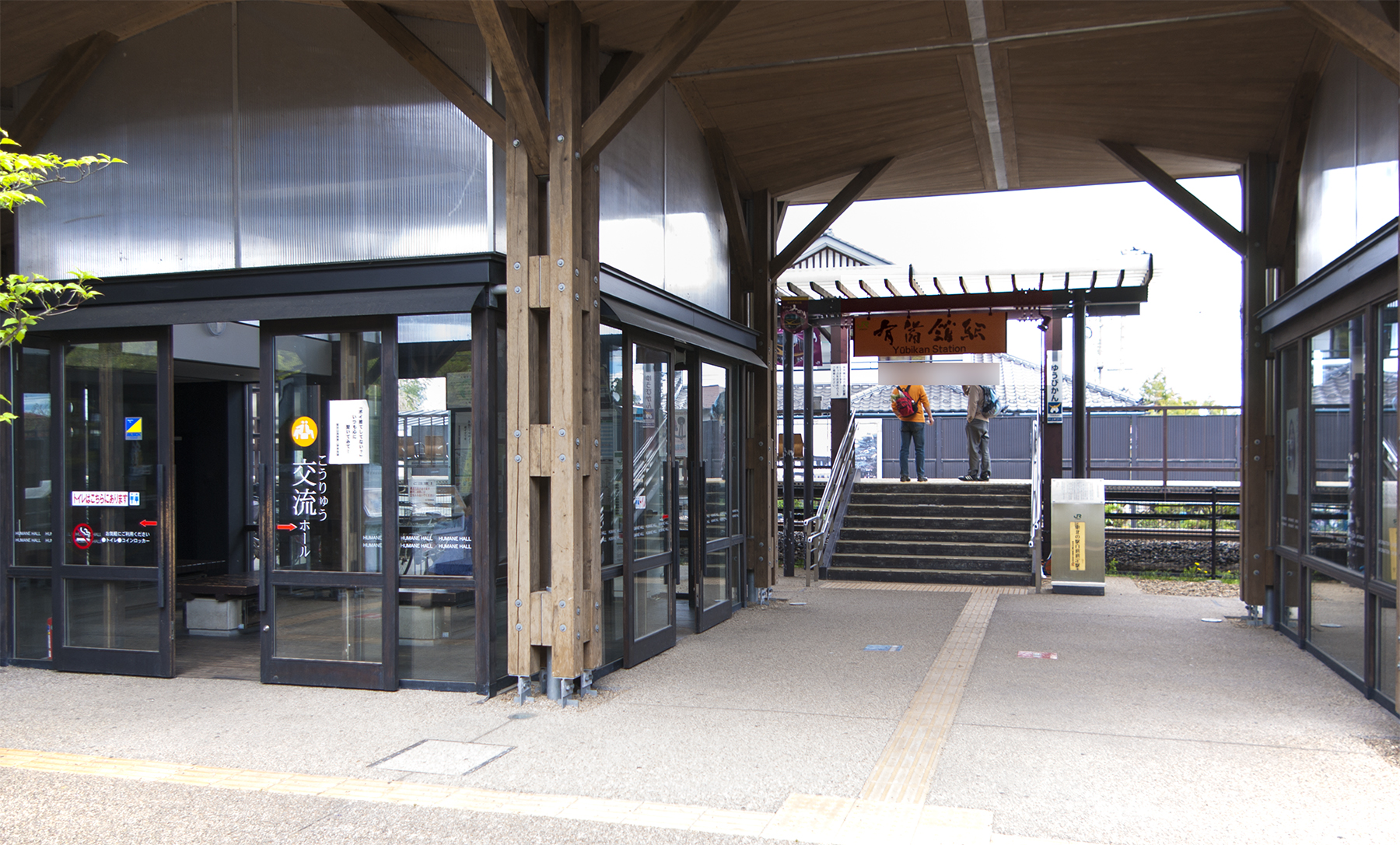 東日本旅客鉄道株式会社陸羽東線有備館駅